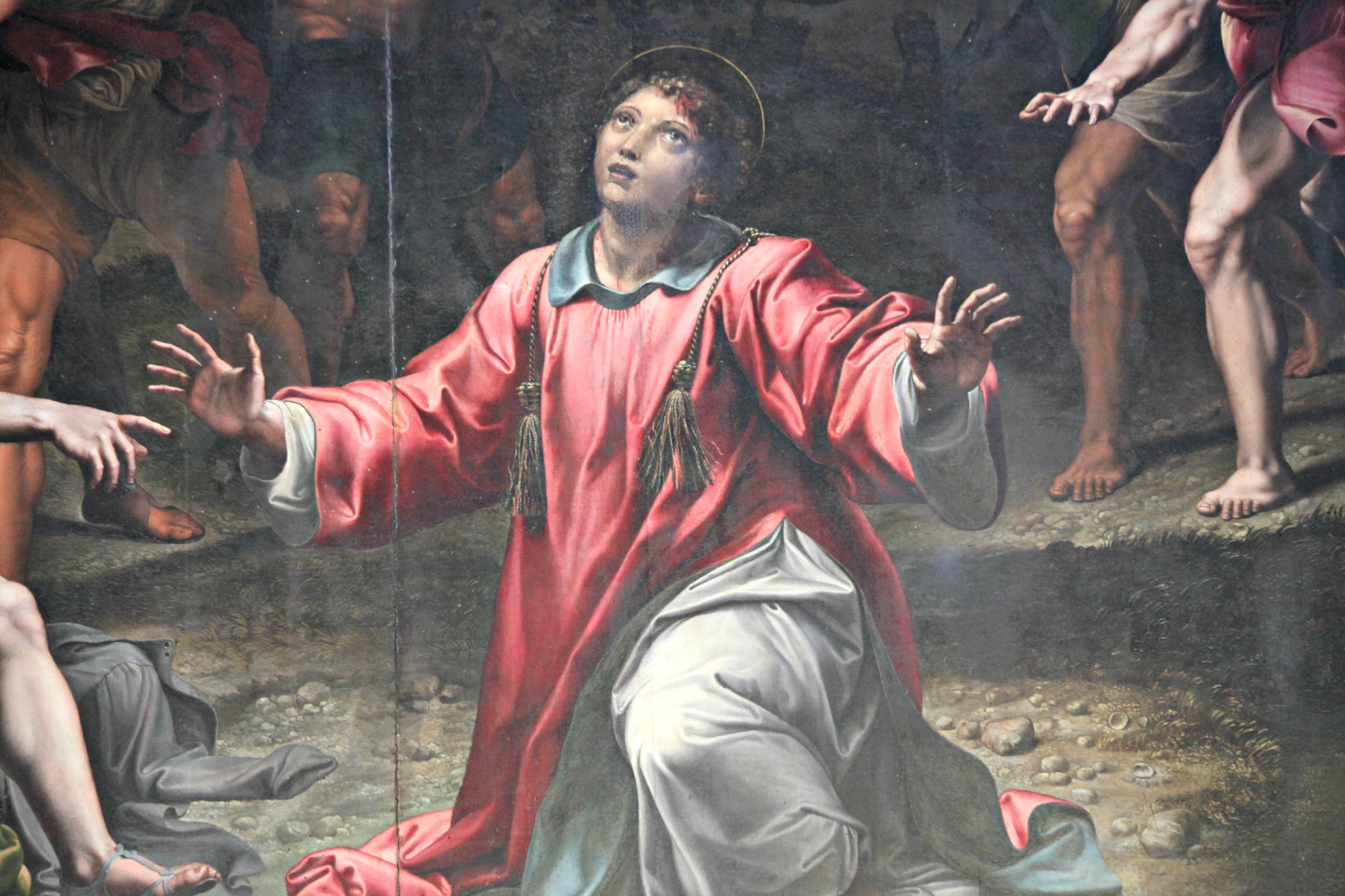 Dettaglio di santo Stefano di Giulio Romano, ch. di santo Stefano (Genoa)